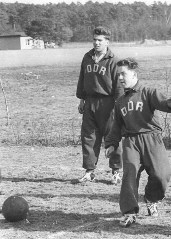 Zentralbild-Beyer Bey-Sch. 23.3.56 DDR-Jugendauswahl für FIFA-Jugendturnier - In der Zeit vom 28. März bis zum 2. April 1956 findet in der ungarischen Hauptstadt Budapest das FIFA-Jugendturnier statt. Die DDR-Auswahlmannschaft wurde in den letzten Tagen in der Sportschule Strausberg zusammengezogen und bereitet sich unter der bewährten Leitung der beiden Trainer Belger und Böning auf die kommende Aufgabe vor. UBz.: Zielschießen auf dem Sportplatz. Während Albrecht Strohmeyer (Lok Stendal) geschossen hat, schaut Wolfgang Domke (Motor Berlin, links) interessiert zu.